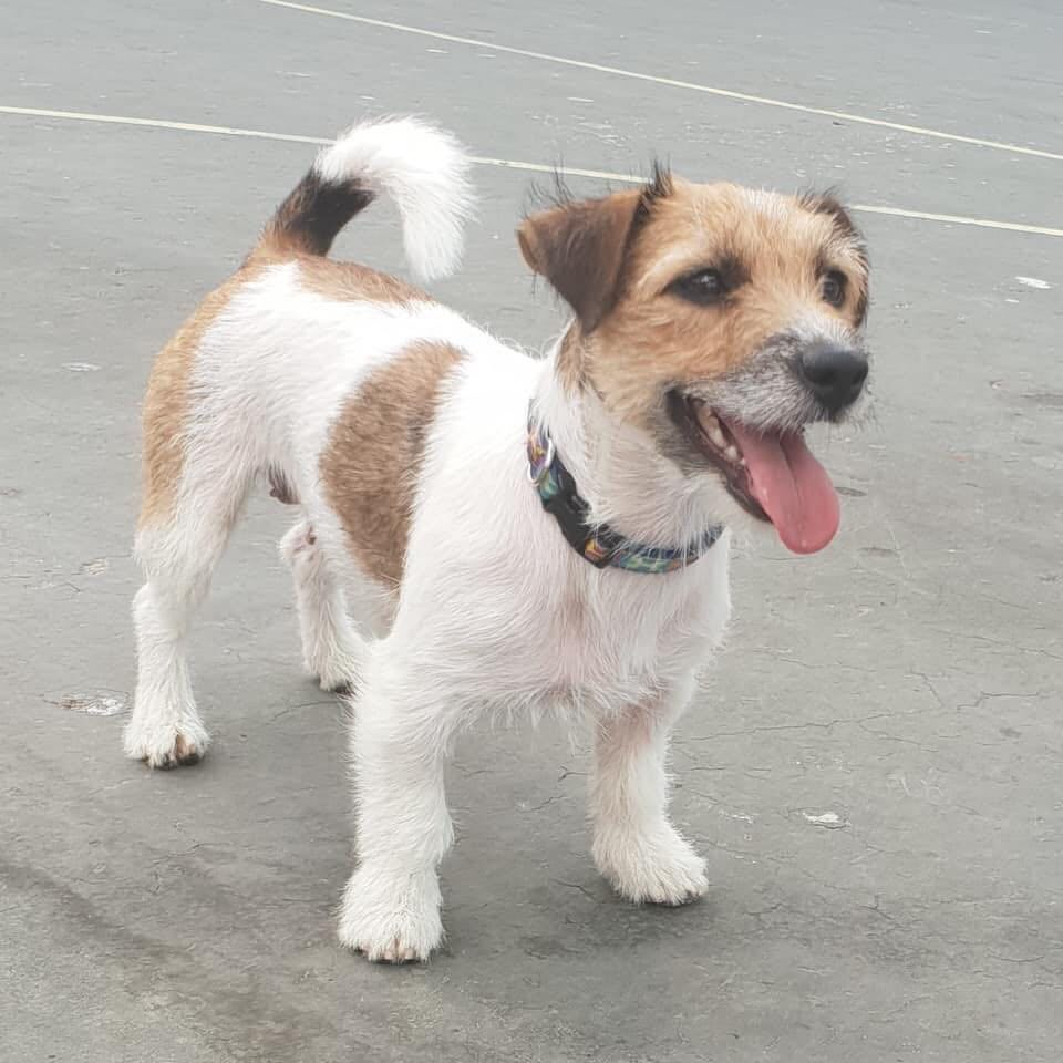 שיער שבור